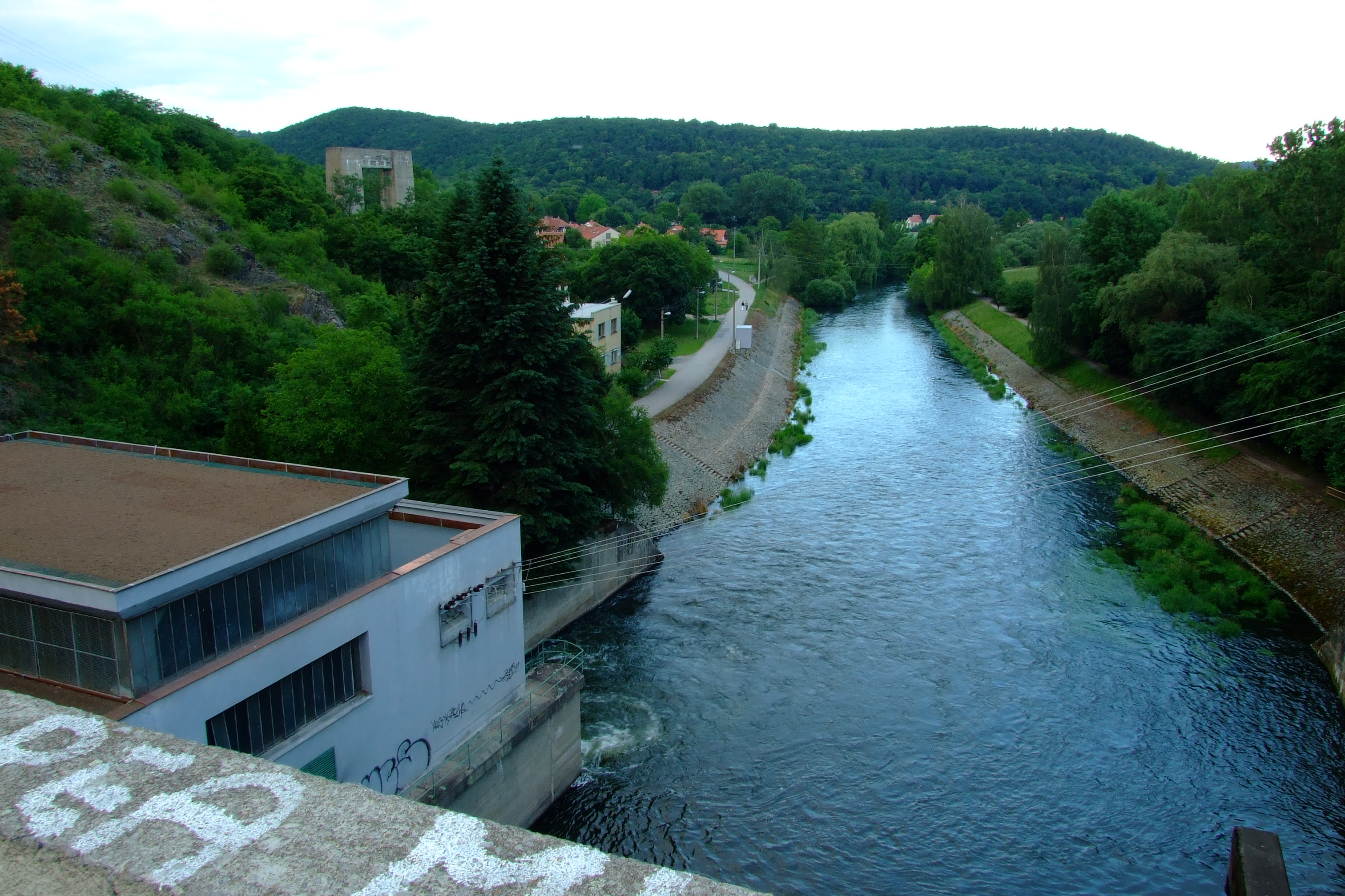 Vlevo od středu řeky Svratky se rozkládá městská část Brno-Kníničky, vpravo městská část Brno-Bystrc Vyfotografováno z bystrcké části hráze Brněnské přehrady